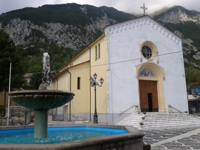 Chiesa della Santissima Trinità vista dalla fontana